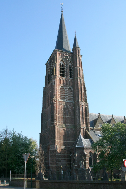 Loon op Zand - Oranjeplein 1 - St. Jans Onthoofding kerk